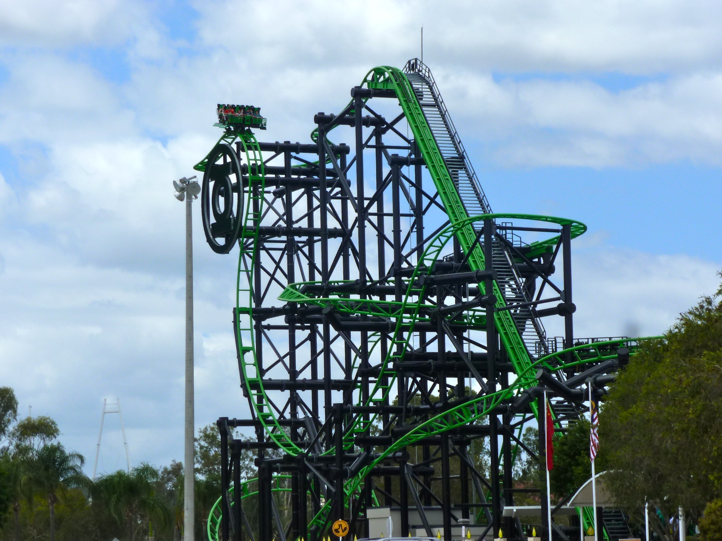 Movieworld